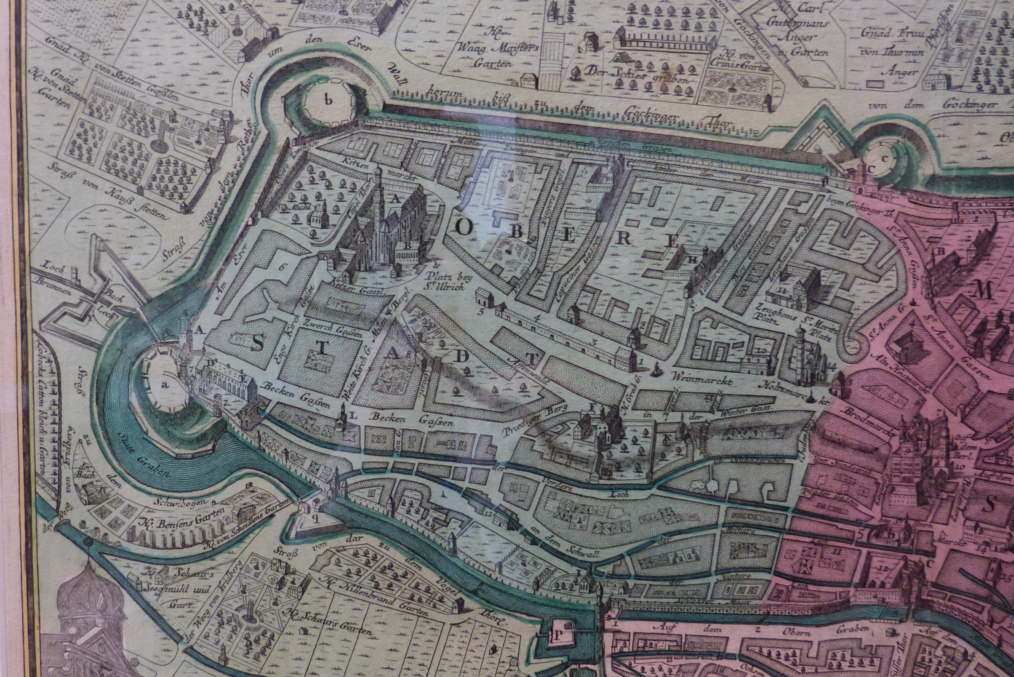 Ausschnitt von File:Augsburg-Karte Matthäus Seutter ca. 1730.jpg, der die Augsburger "Obere Stadt" zeigt.